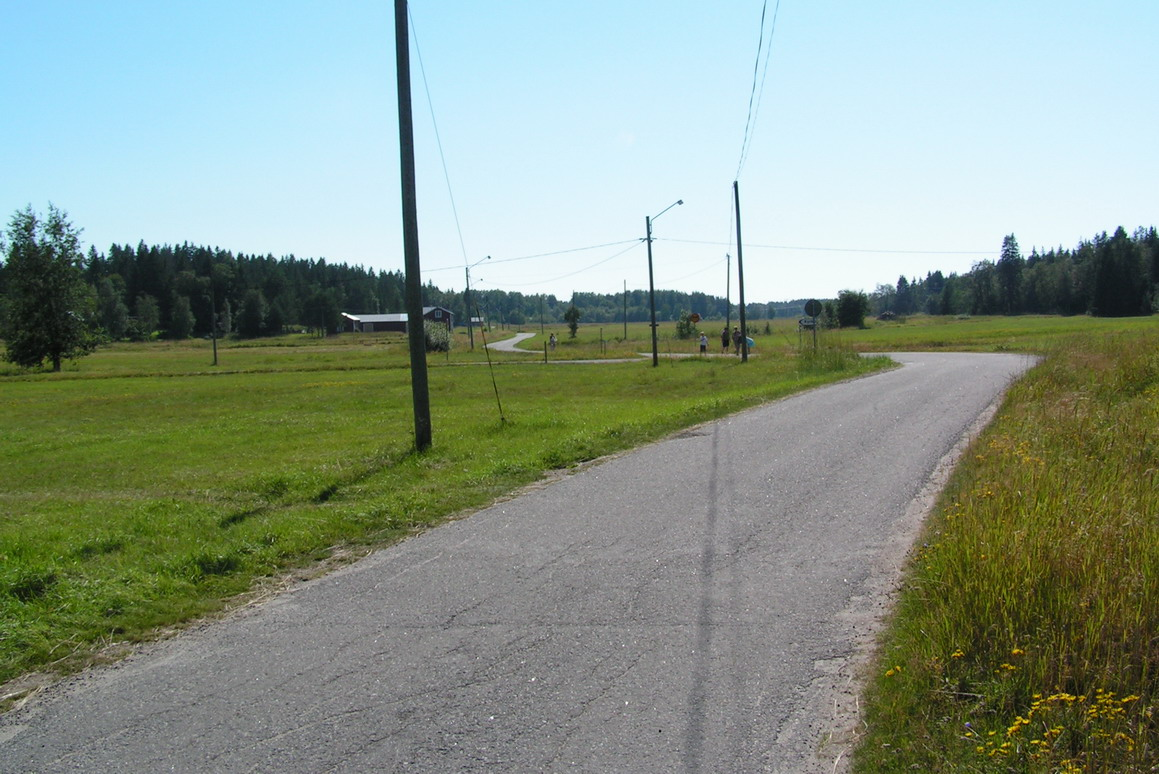 Byavägen vid Byviken, Holmön, Sweden